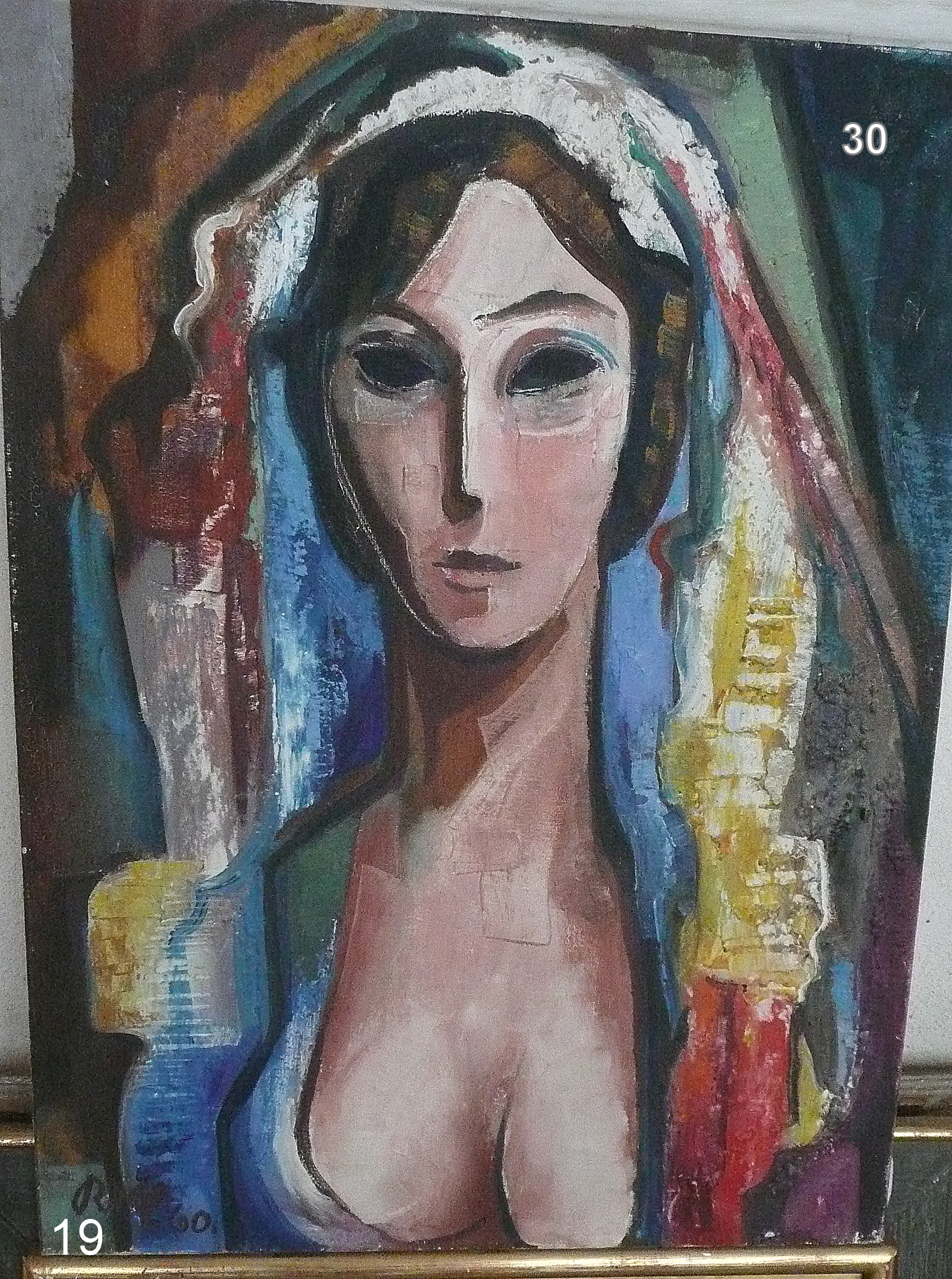 Femme au voile multicolore. Huile sur toile peinte par Rolf Hirschland. Daté 1960. Dimensions: 73x54 cm